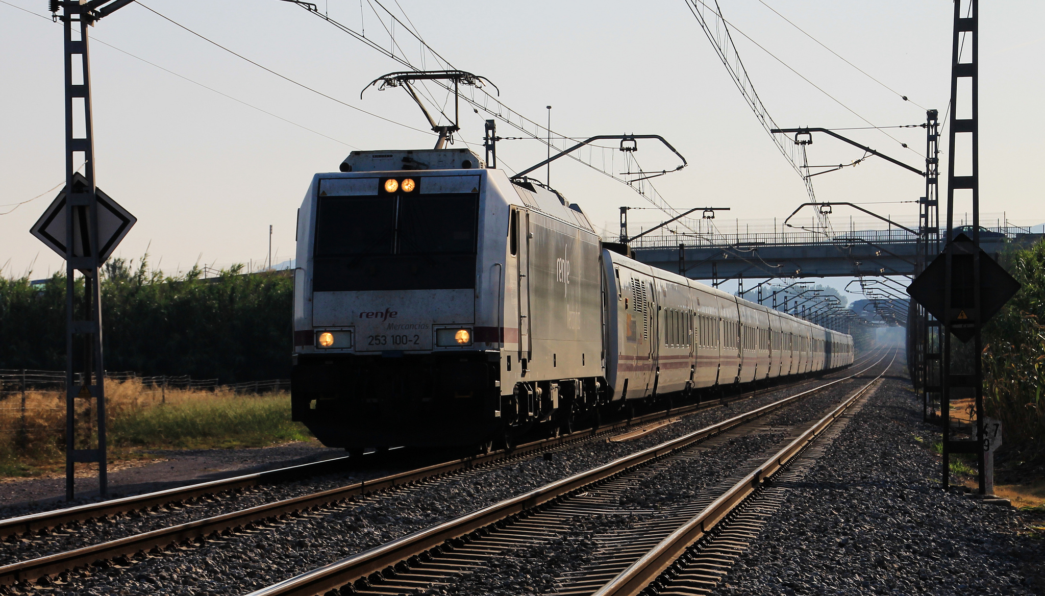 Debido a los incendios de La Jonquera y Portbou se decidió cortar las lineas del TGV y la convencional. Como resultado los trenes que tenían que subir hacia Francia no lo pudieron hacer, incluidos los Trenhotel y sus respectivas 252. Dada la falta de 252 en Portbou se ha procedido a utilizar una 253 para cubrir el servicio de bajada hacia Barcelona y aquí tenéis el resultado.